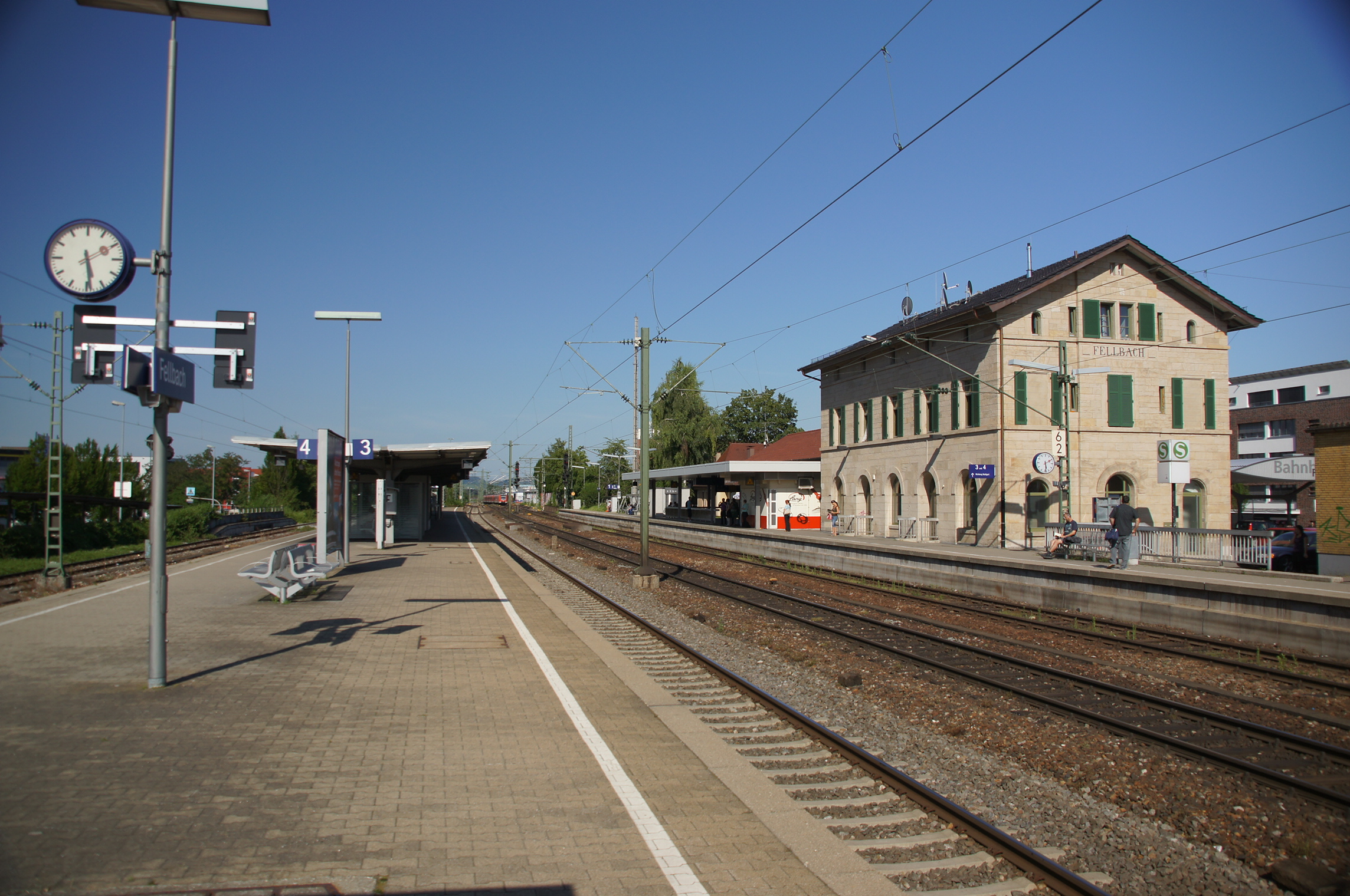 Bahnhof Fellbach